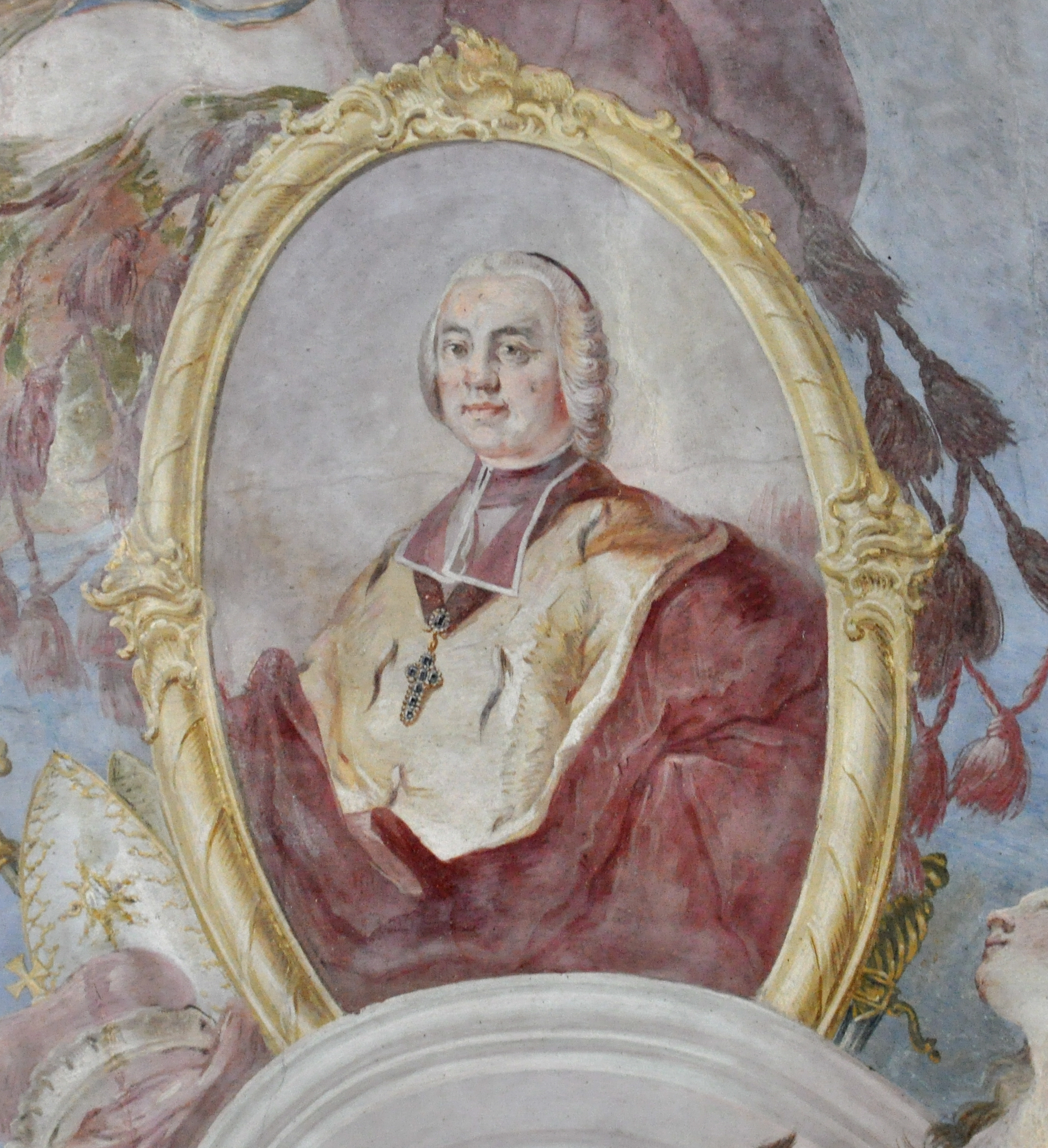 Meersburg, Neues Schloss, Deckenfresko Verherrlichung der fürstbischöflichen Regentschaft (allegorische Verherrlichung des Kardinals Franz Konrad von Rodt), von Joseph Ignaz Appiani, um 1760; Detail: Franz Konrad von Rodt